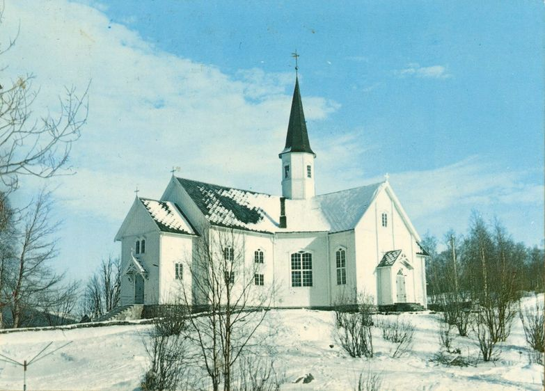 Hemnes kirke, Nordland. Ukjent fotograf. Fra Riksantikvarens Kulturminnesøk.